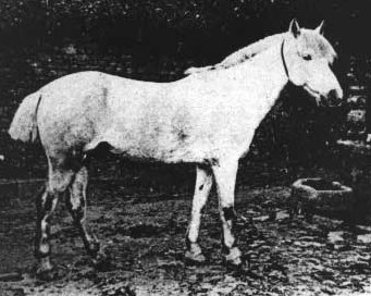 Le bidet Breton, March Land, 1,48 m, gris truité, un type de cheval désormais disparu. Publication de la revue "Sport universel illustré".